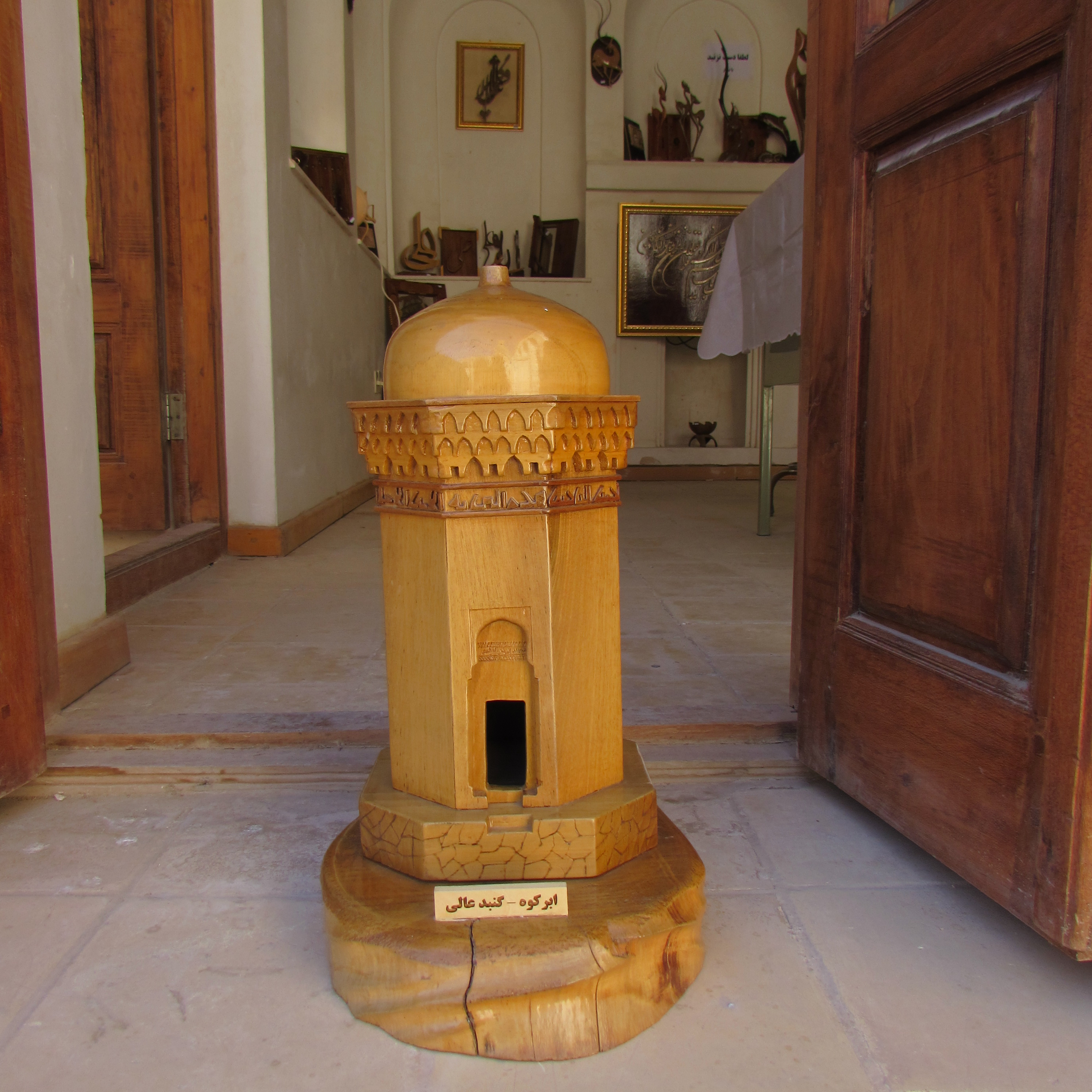 ماکت . مقبره یکی از شاهان سلجوقی